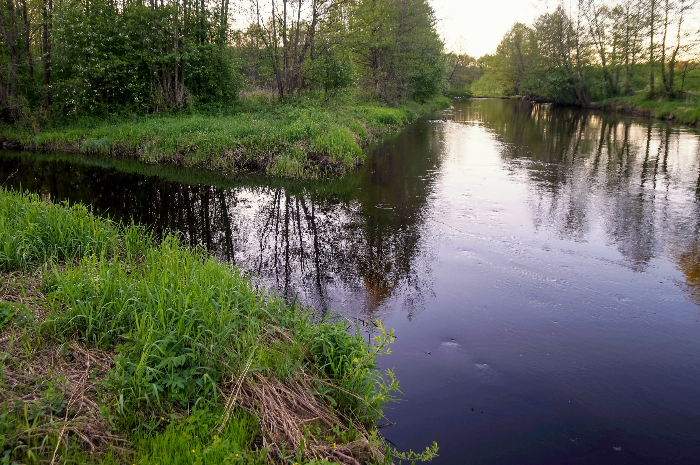 Спягліца і Нарачанка